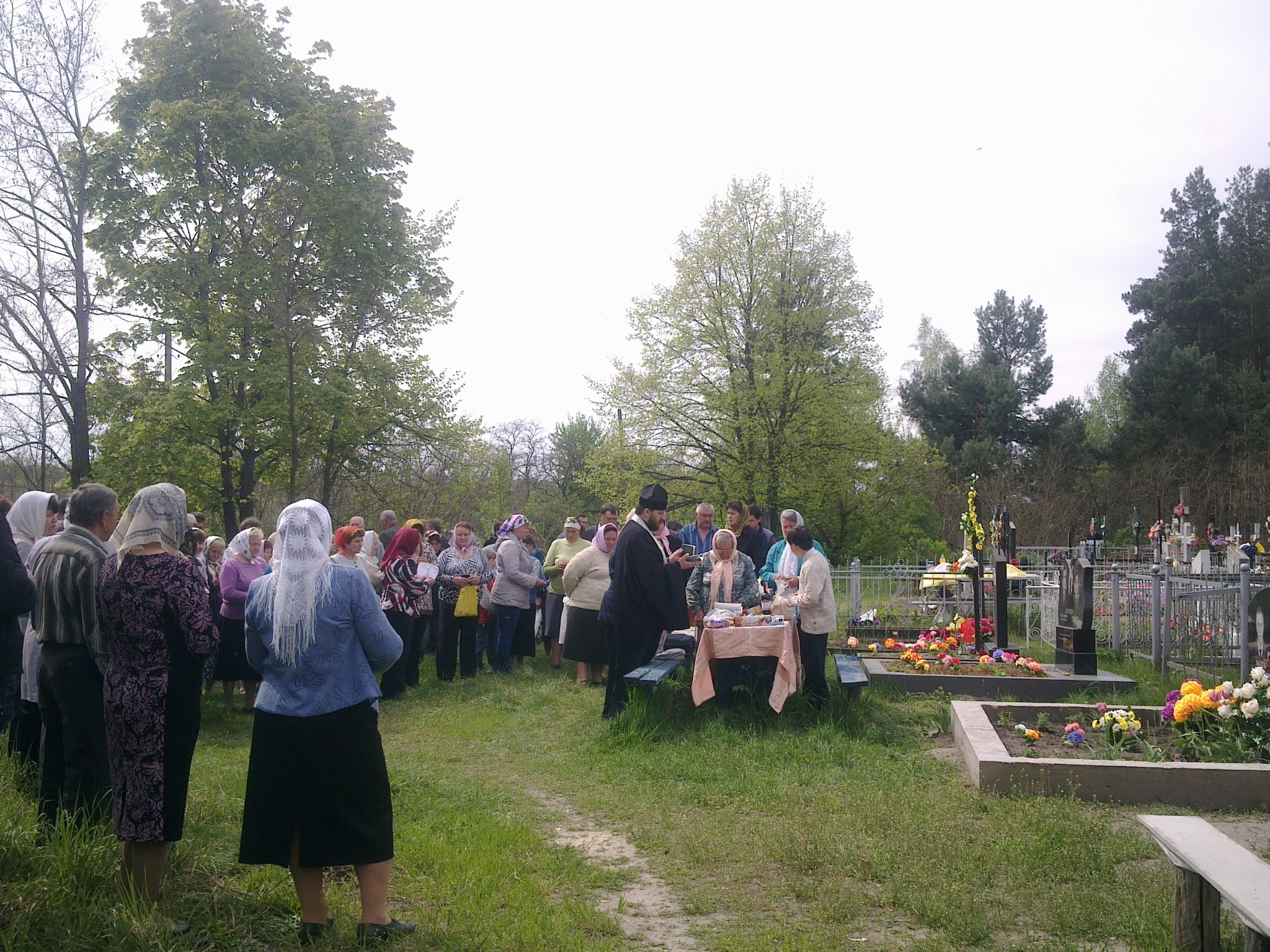 Проводи на Хуторі Тимки, 2014